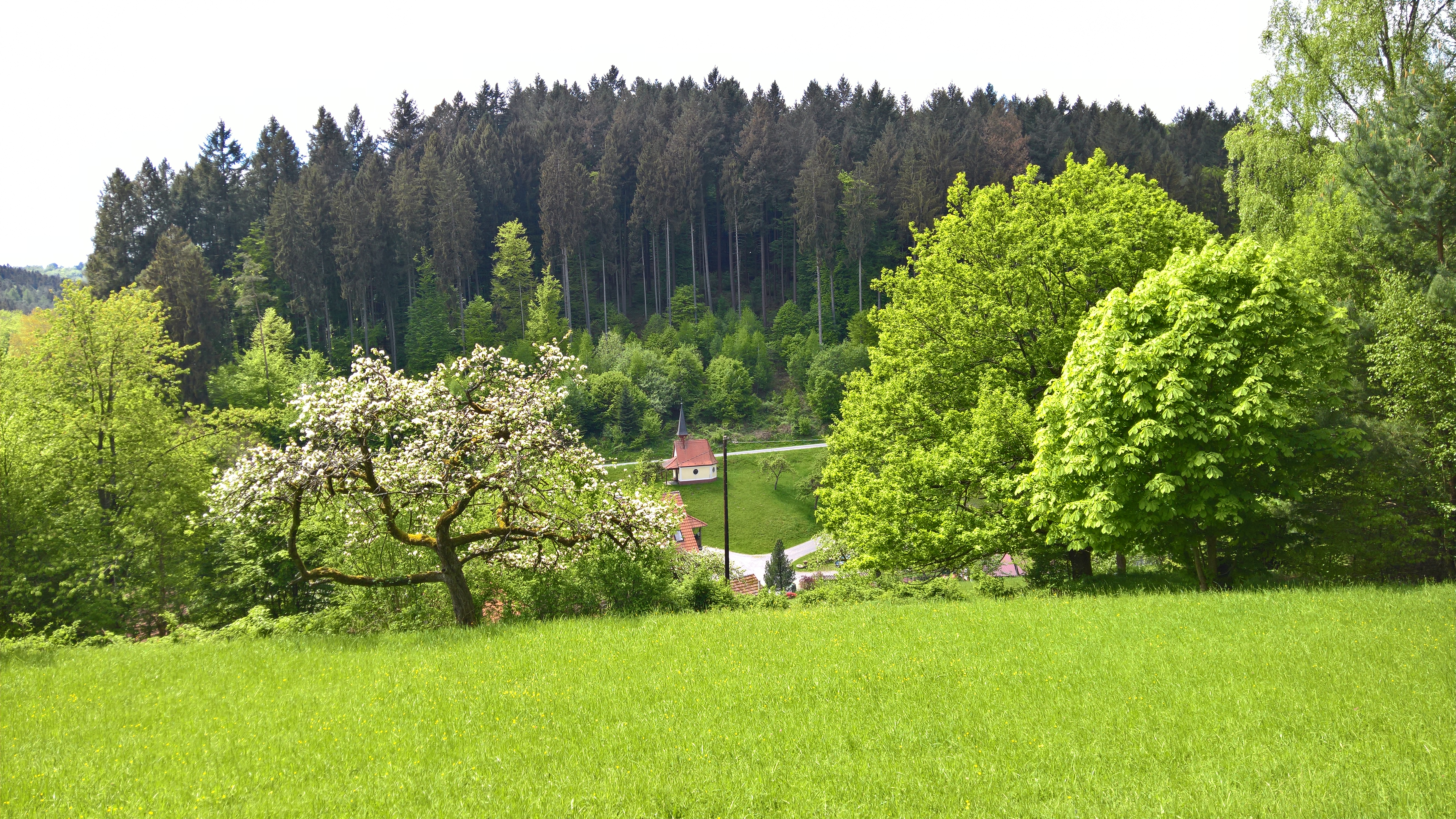 Blick auf der Höhe unterhalb des Baumgartshofes ins Schleifbachtal. Die Kapelle der Schleifmühle ist sichtbar.